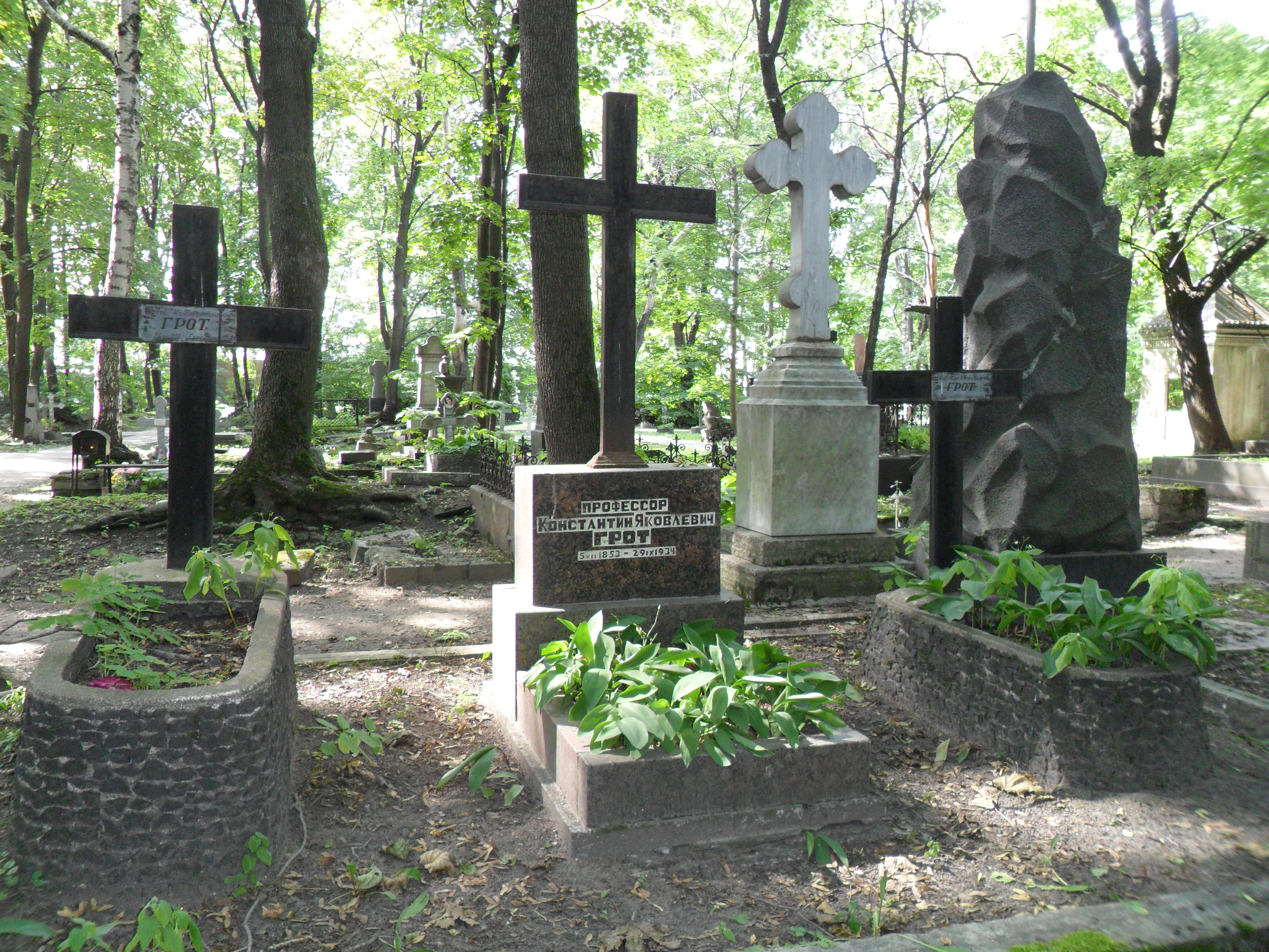 Могила российского филолога-слависта, архивиста Константина Яковлевича Грота на кладбище Новодевичьего монастыря в Санкт-Петербурге